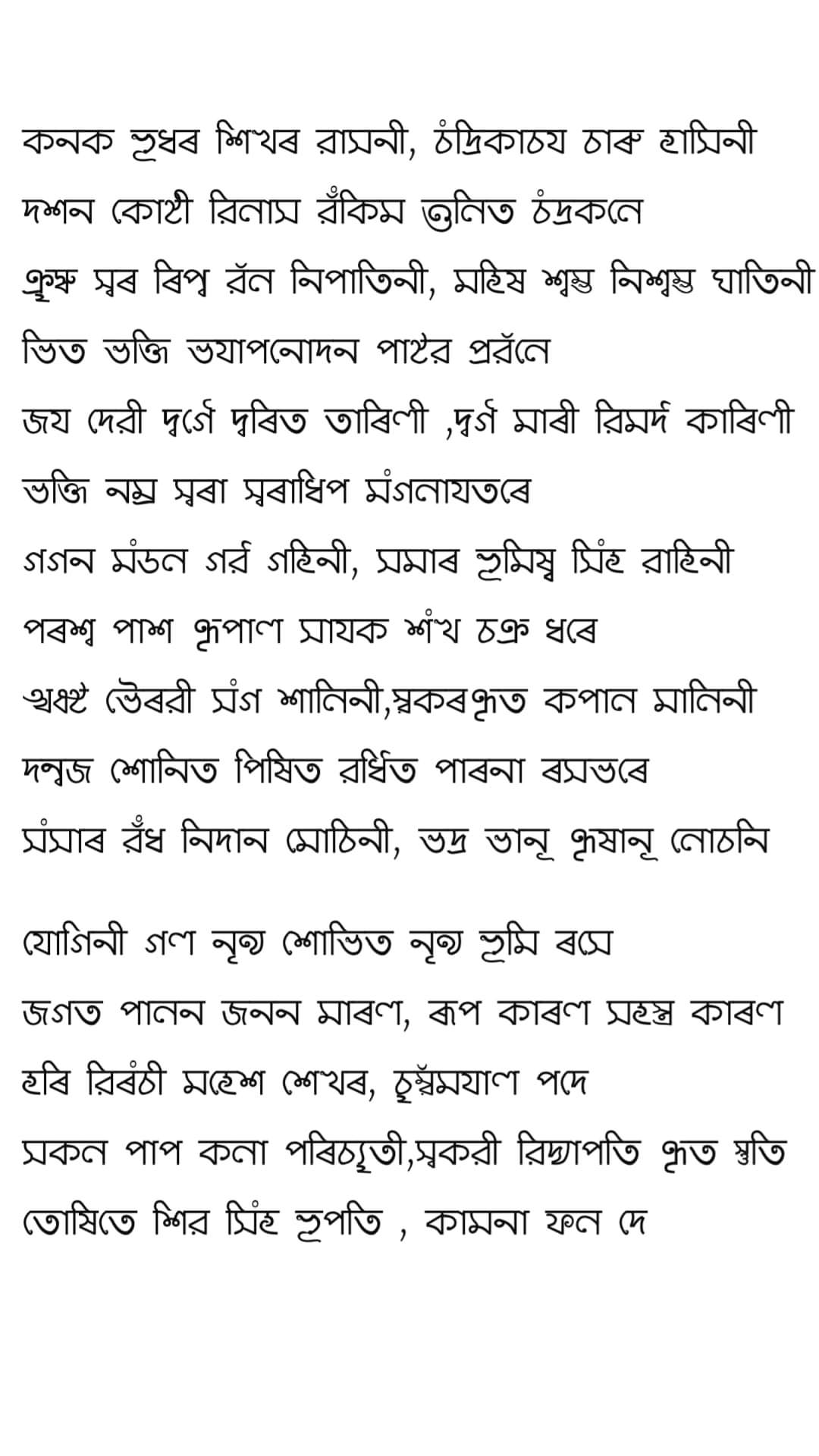 মৈথিলী ভাষার ঐতিহ্যবাহী মিথিলাক্ষর লিপিতে দেবী দুর্গার বন্দনা